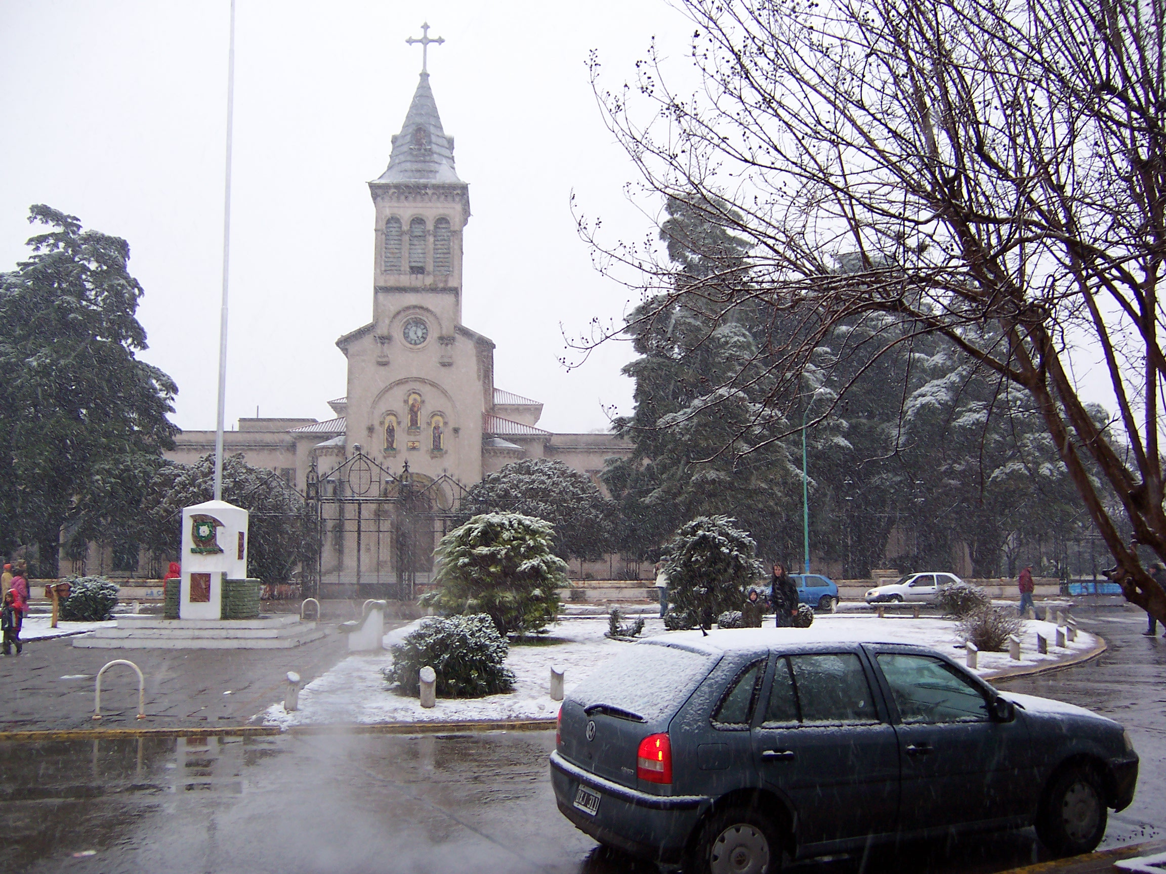 Iglesia de San Antonio de Padua bajo la nieve